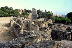 vila romana dels munts